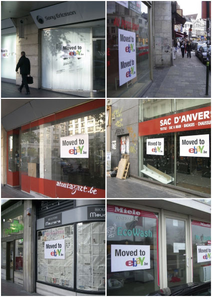 Een goed voorbeeld van guerrillamarketing. De printjes kosten misschien een paar euro, maar het bereik is ontzettend groot.